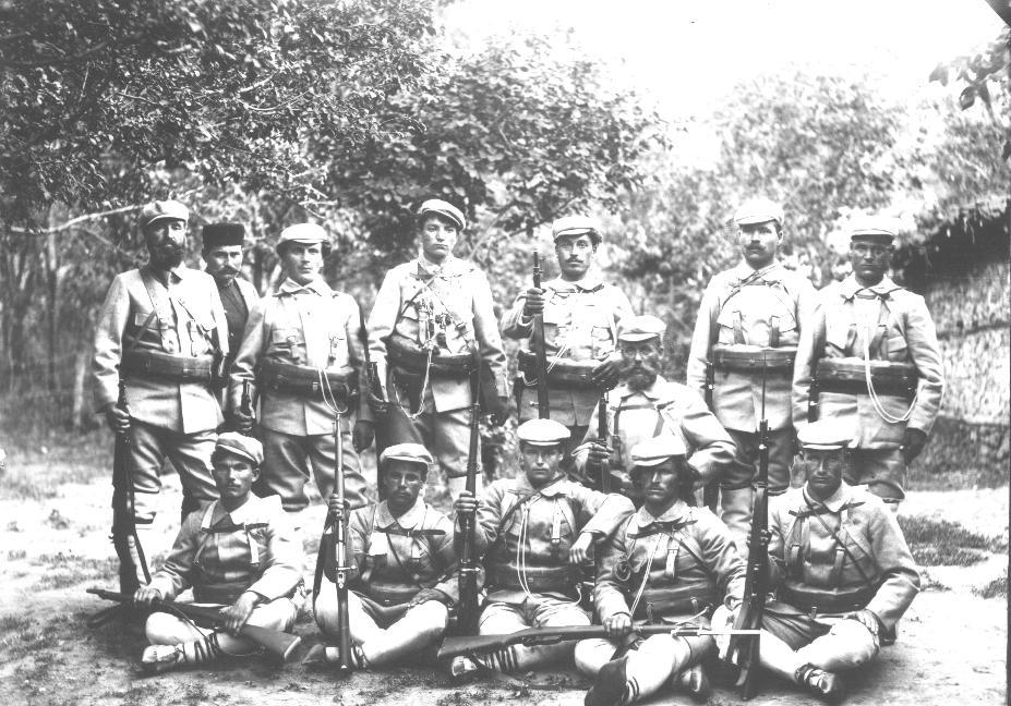 IMARO voevoda Grozdan Randev and his cheta